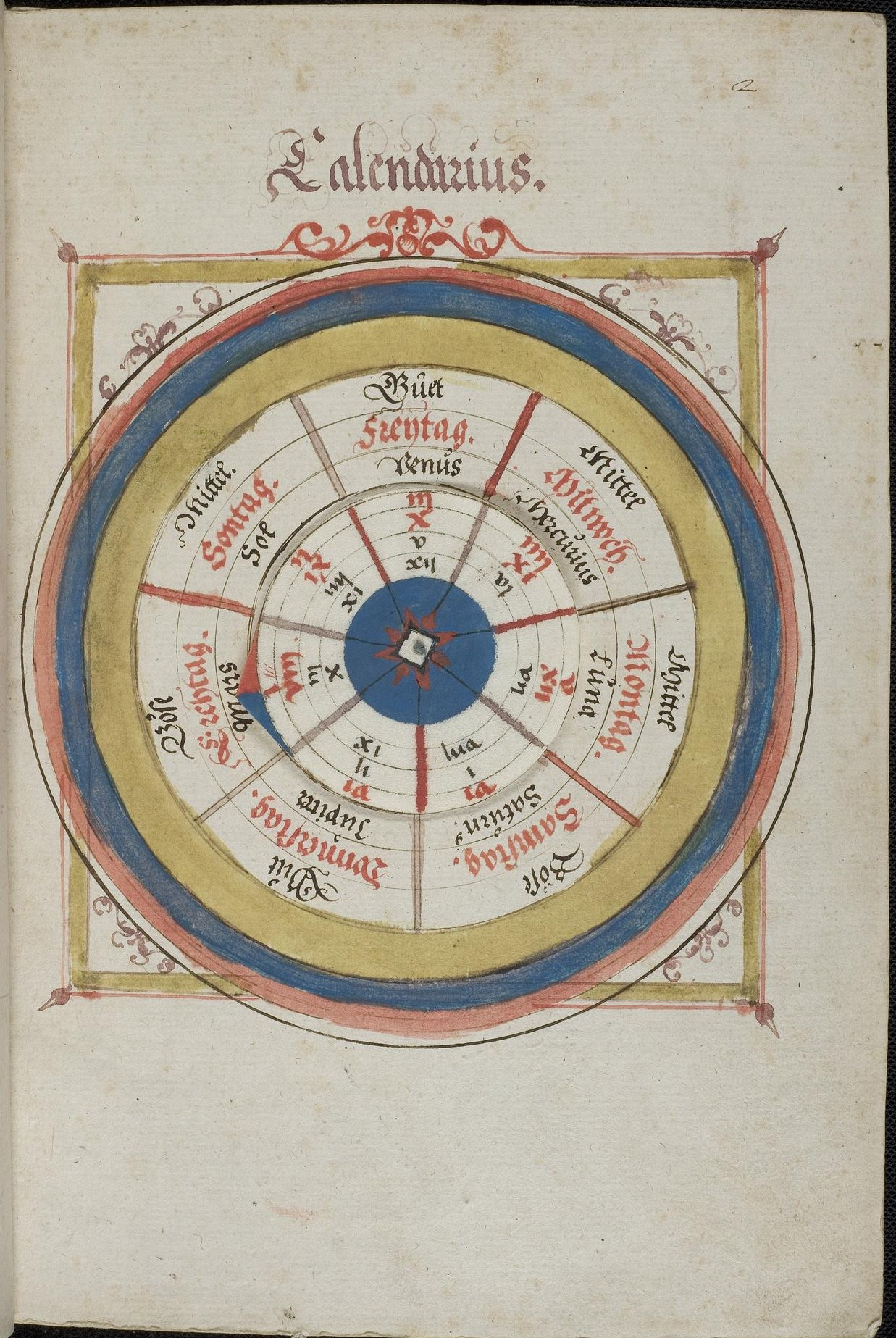 Codex Palatinus germanicus 6, Blatt 2r der Handschrift: Johannes Hartlieb, De mansionibus (deutsch), Kalender (drehbare Scheibe)